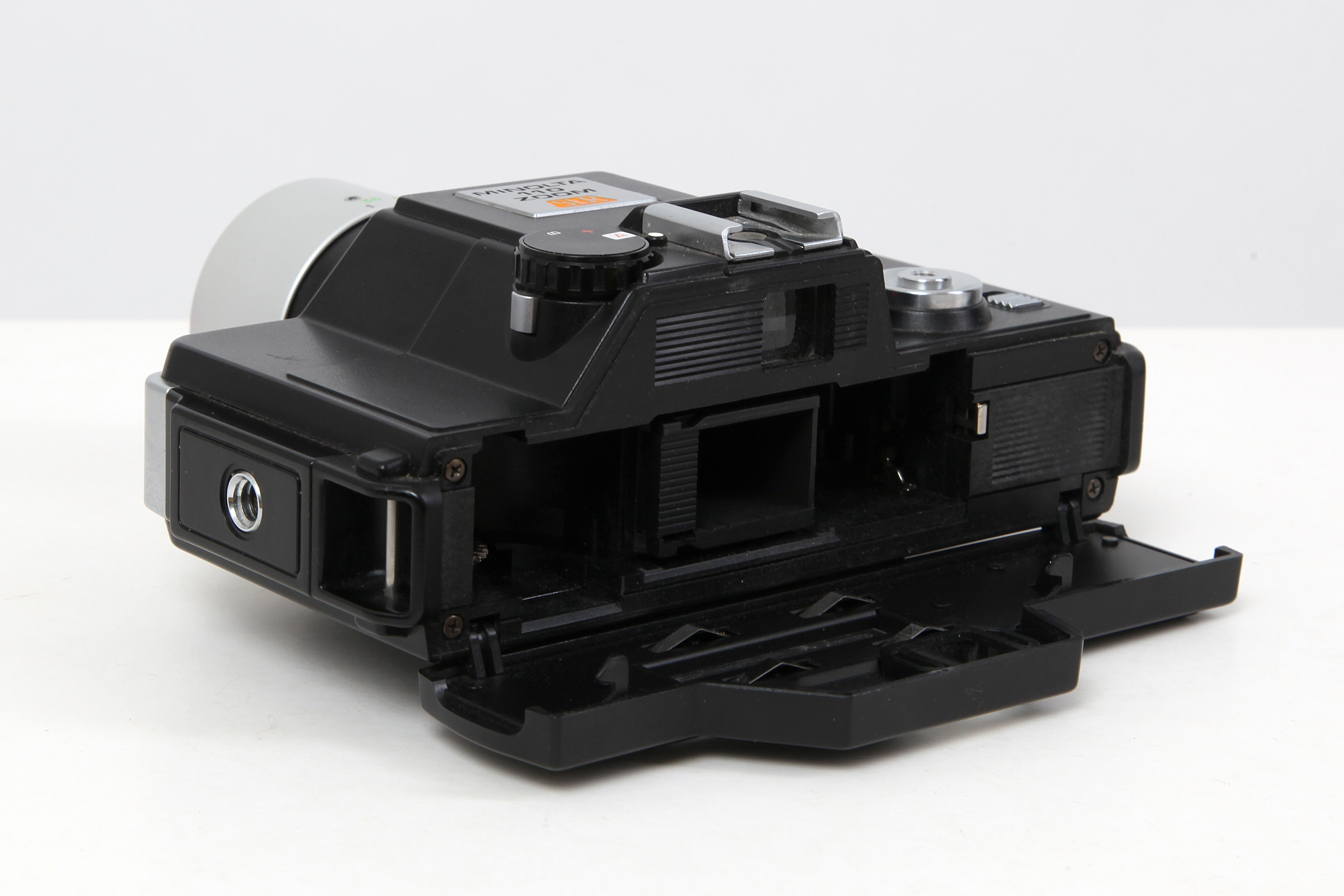 Fotoapparat Minolta 110 Zoom SLR, geöffnet